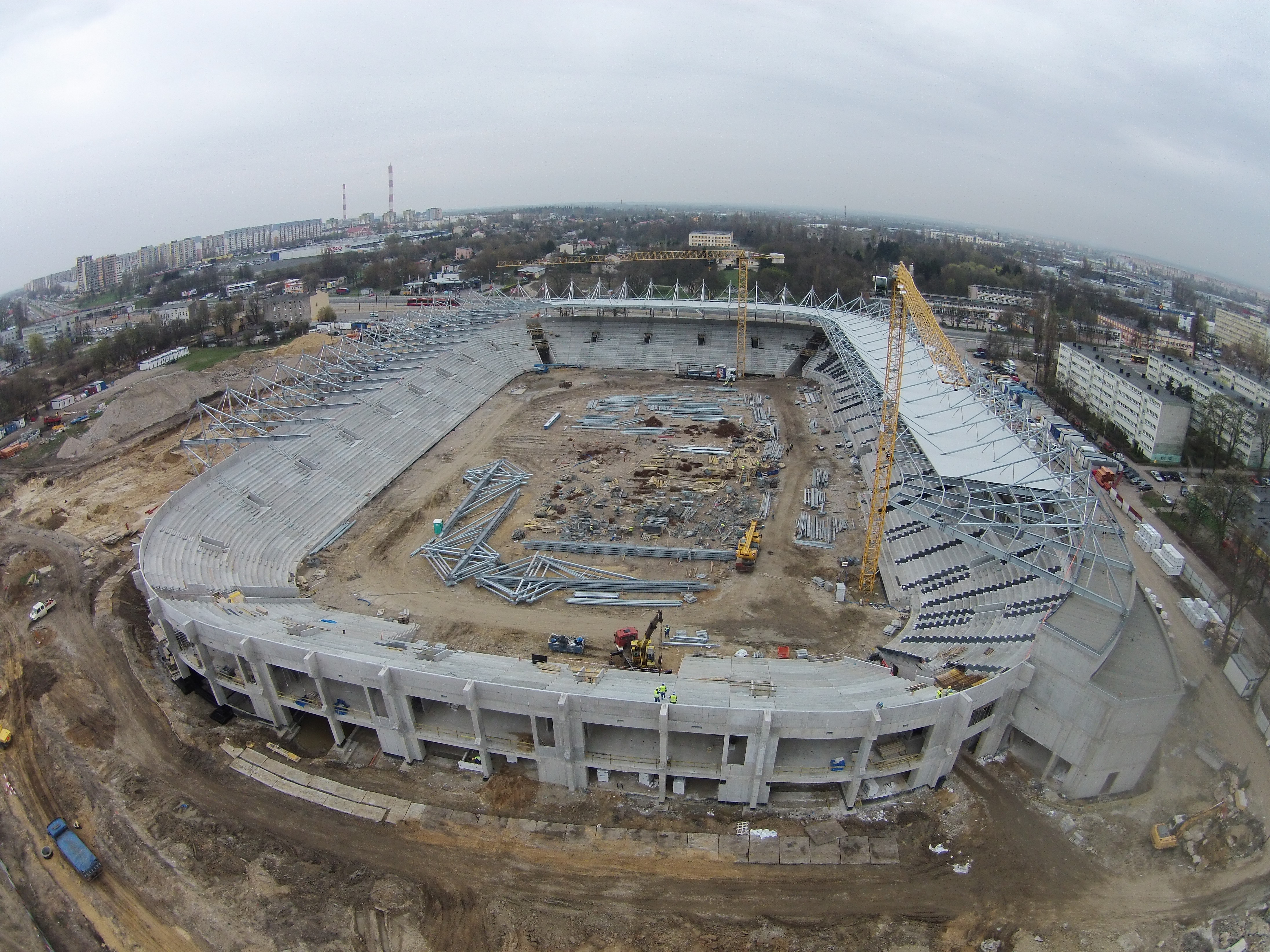 Budowa stadionu na Widzewie w Łodzi. Widok z lotu ptaka.